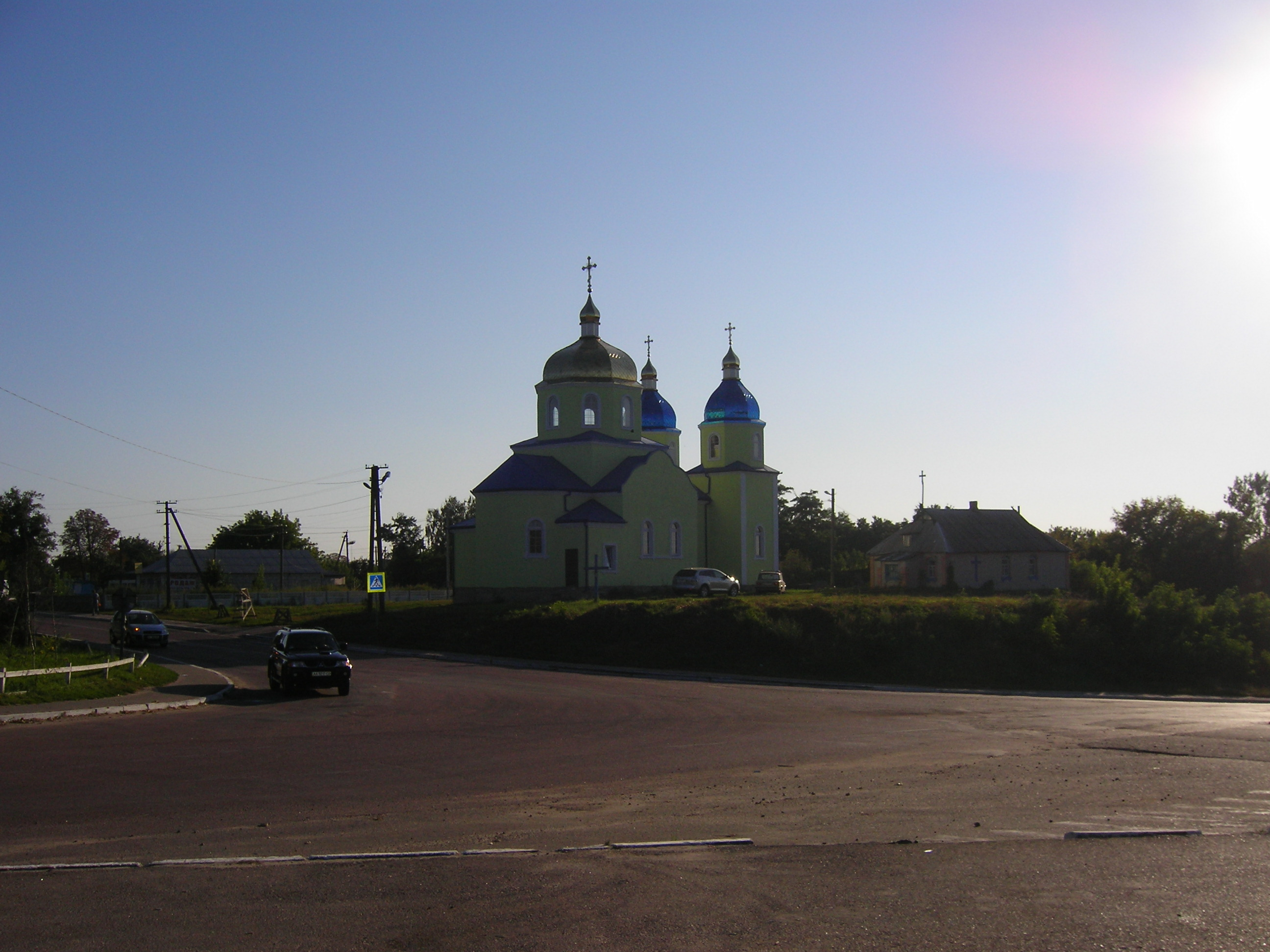 Церква в Бишеві